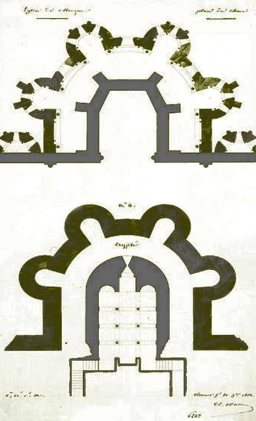 Plan du choeur et de la crypte de l'église disparue de Manzat